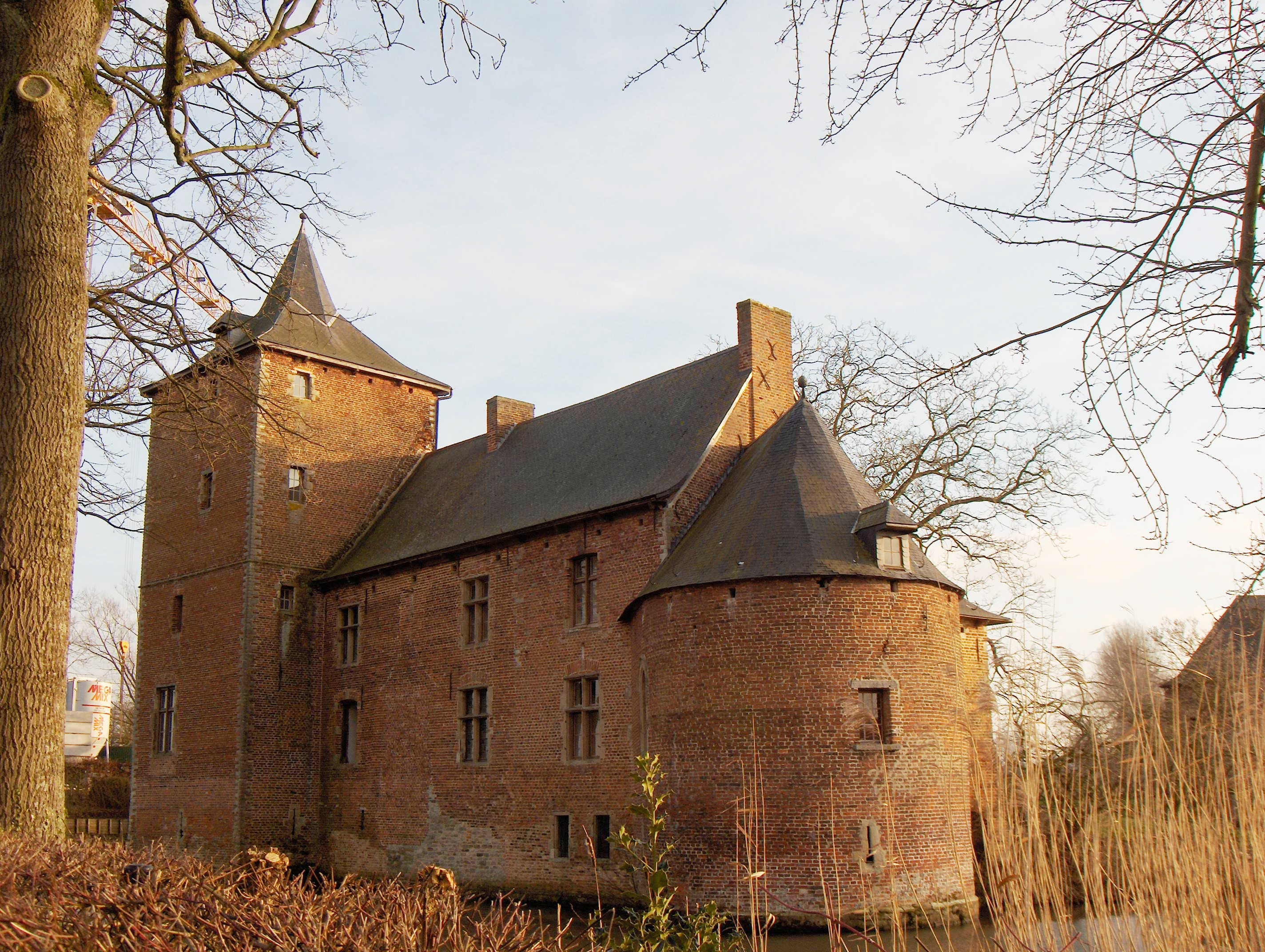 Gooik (Belgien, Prov. Ostflandern), Ortsteil Oetingen, Schloss Van Heetvelde (16. Jh.).